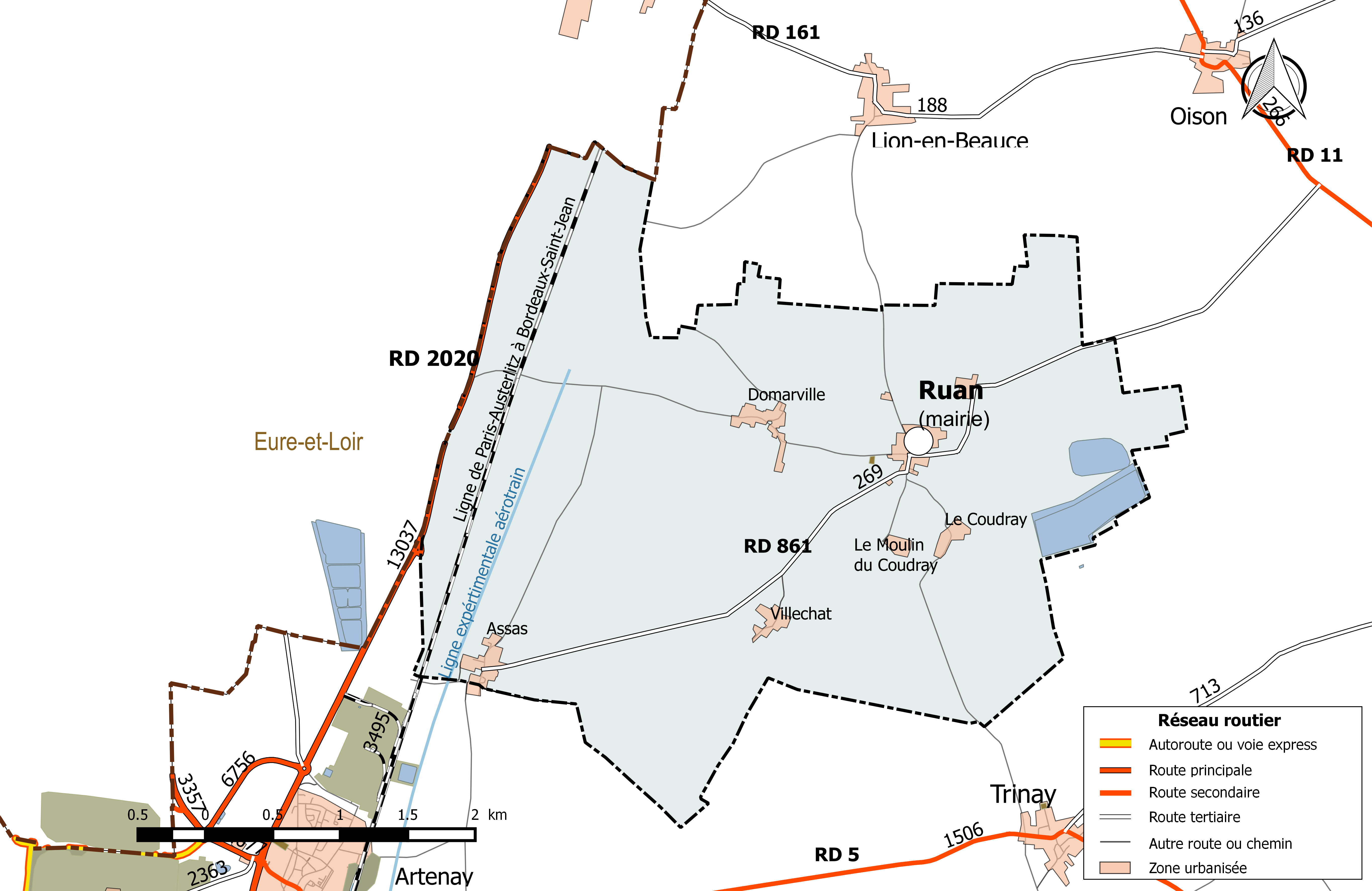 Carte du réseau routier de la commune de Ruan (Loiret).